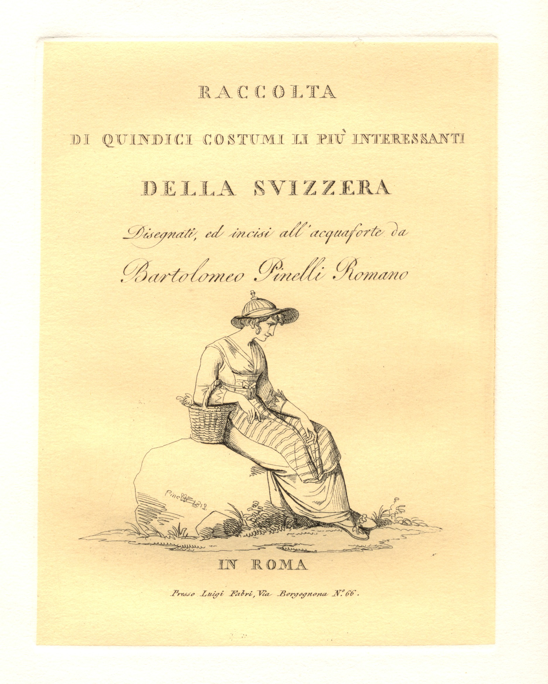 Frontespizio de: RACCOLTA DI QUINDICI COSTUMI LI PIU' INTERESSANTI DELLA SVIZZERA Disegnati ed incisi all'acquaforte da Bartolomeo Pinelli Romano IN ROMA presso Luigi Fabri, Via Borgognona, N°. 66 Roma, 1813